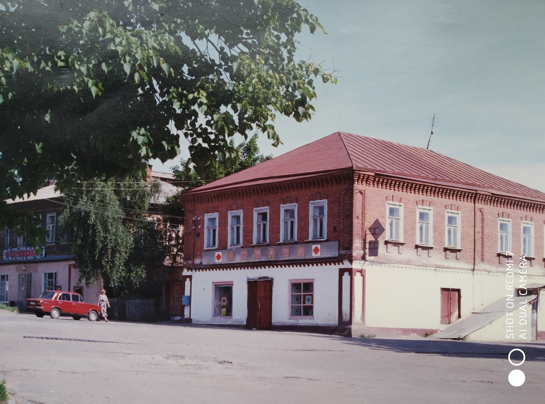 Кольчугино Дом Белышевых